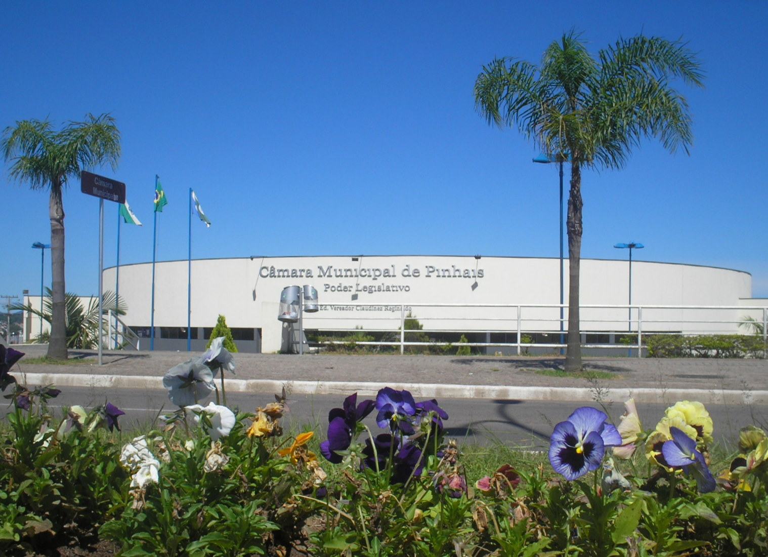 Câmara Municipal de Pinhais, PR, Sul do Brasil.